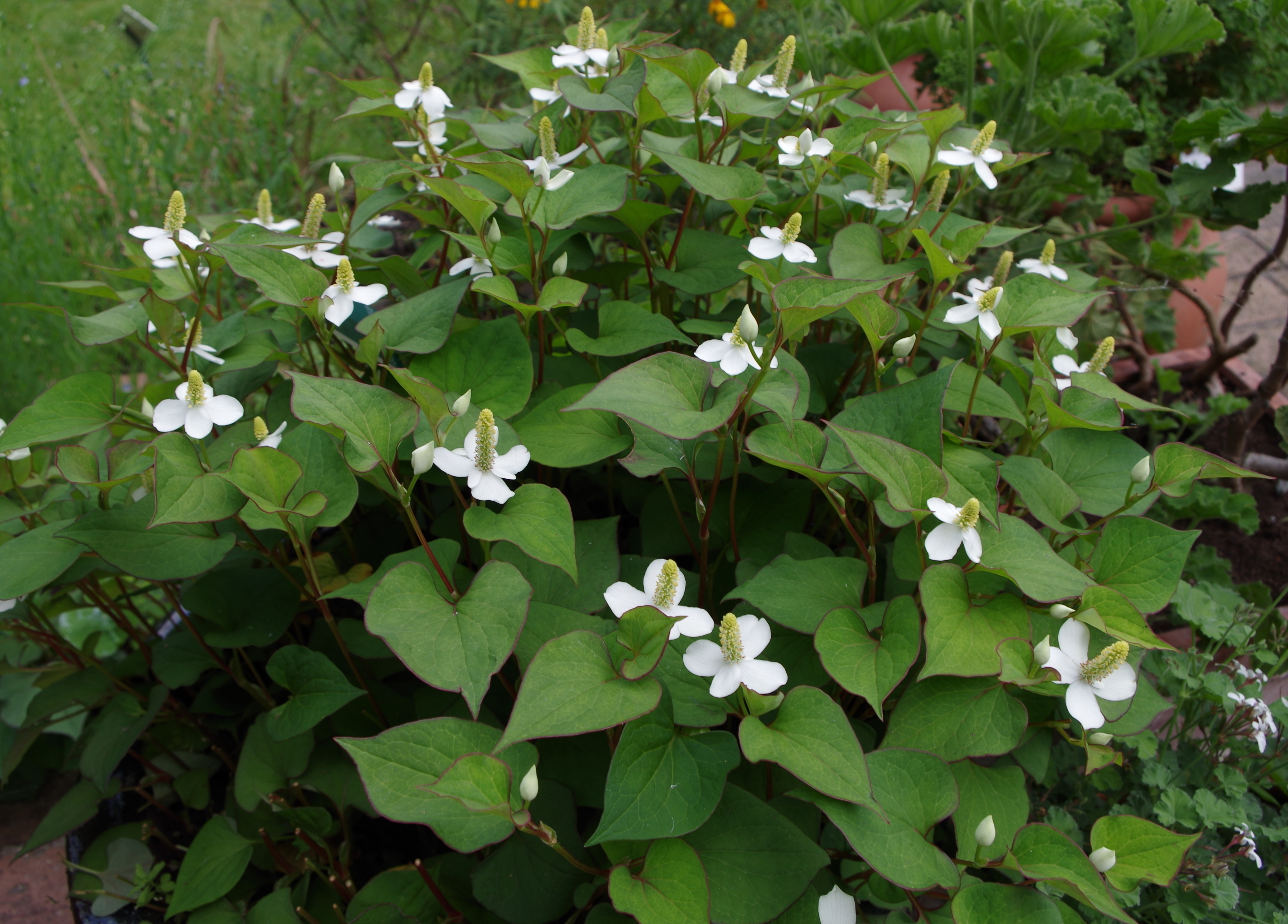 Houttuynia cordata - Parc floral